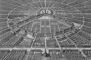 Ansicht von Schloss und Stadt Karlsruhe, Blick nach Norden, Kupferstich von Christian Thran, 1739 (Original im Stadtarchiv Karlsruhe, 8/PBS o XVI 15)